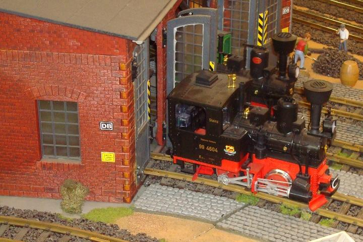 Ausschnitt der Lehmann-Gross-Bahn (LGB) Ausstellungsanlage am Messestand von Märklin in der Spur IIm an der Spiel und Hobby Messe Suisse Toy (Schweiz) im Herbst 2009.